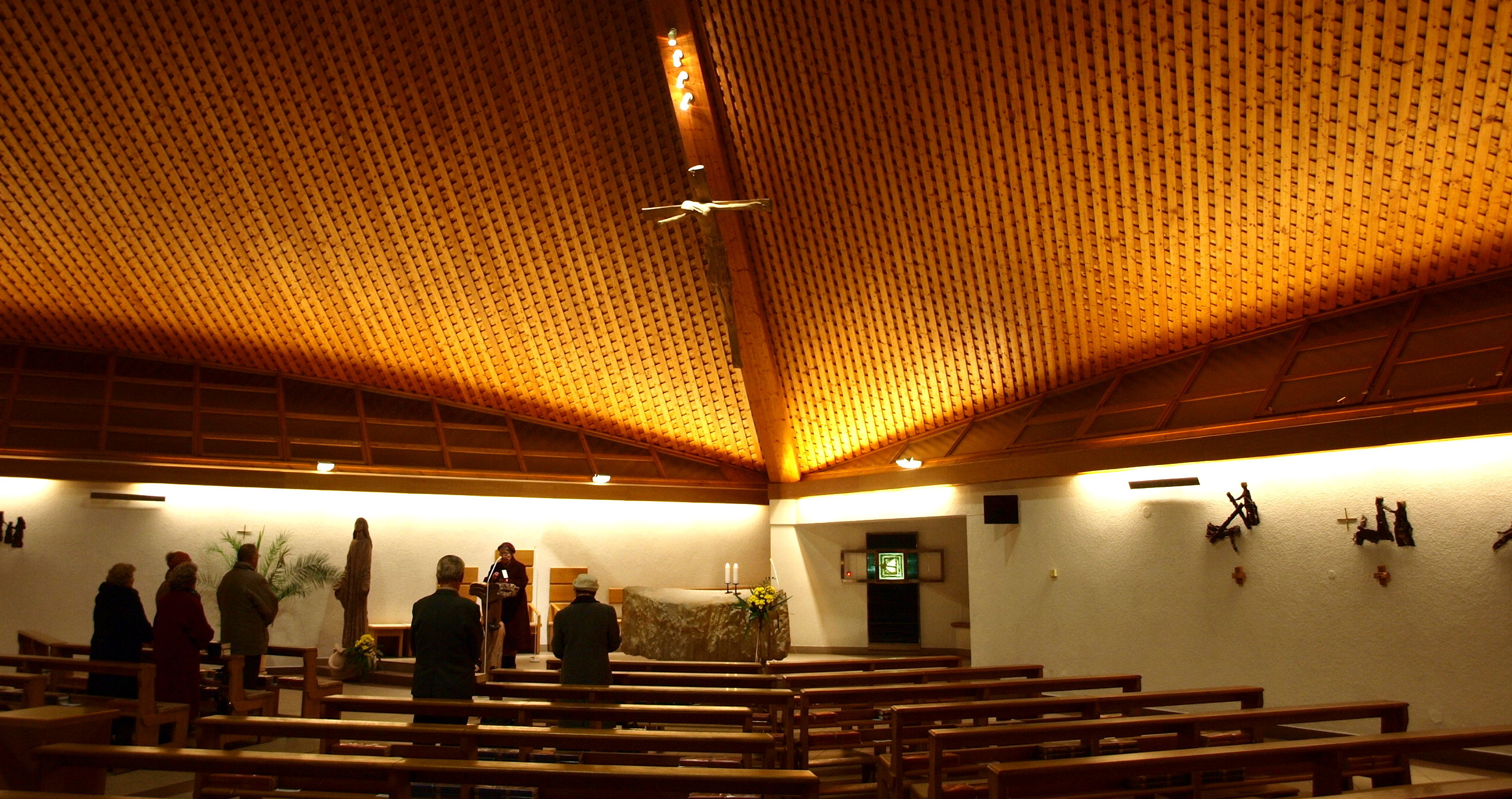 Kostel Panny Marie Strašnice